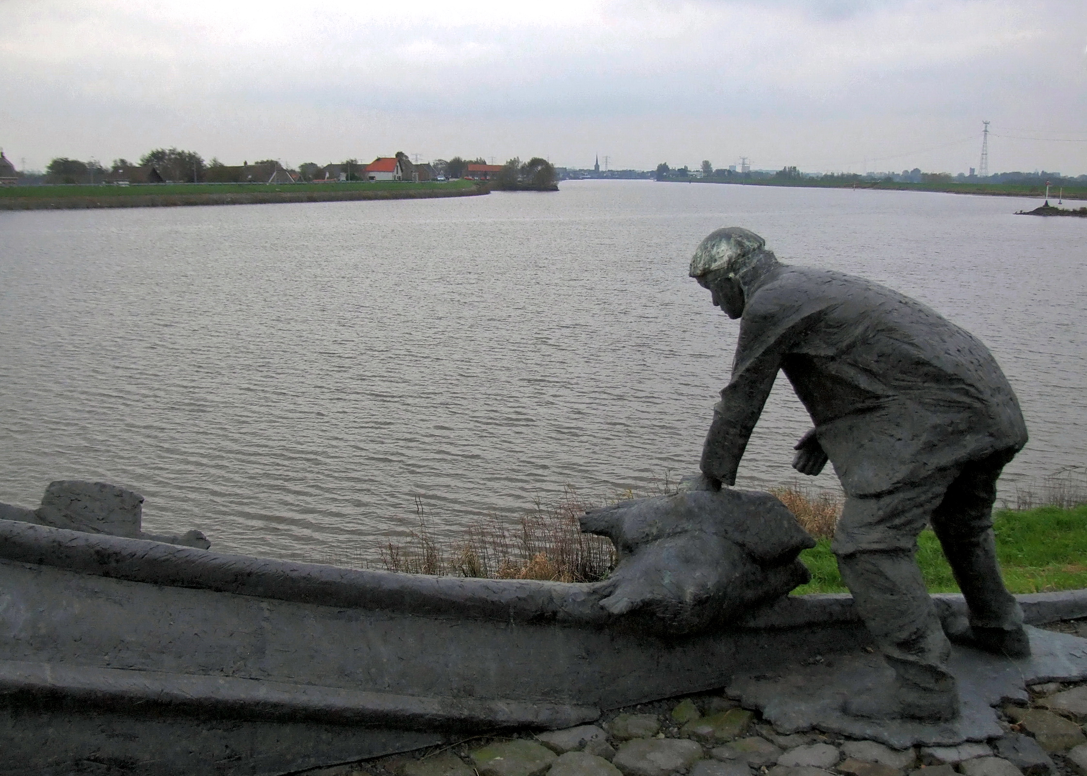 Nieuwerkerk aan den IJssel: "Een dubbeltje op zijn kant" "Een dubbeltje op zijn kant" - auf Messers Schneide - heißt dieses Denkmal am Deich von Nieuwerkerk aan den IJssel und erinnert an die Hollandflut am 1. Februar 1953.